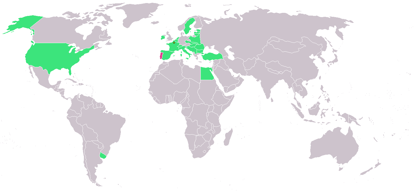 Pays ayant participé aux compétitions de football lors des JO de 1924. Bleu = Équipes ayant participé au tournoi Rose = Équipe forfait Le carré jaune représente la ville hôte (Paris)